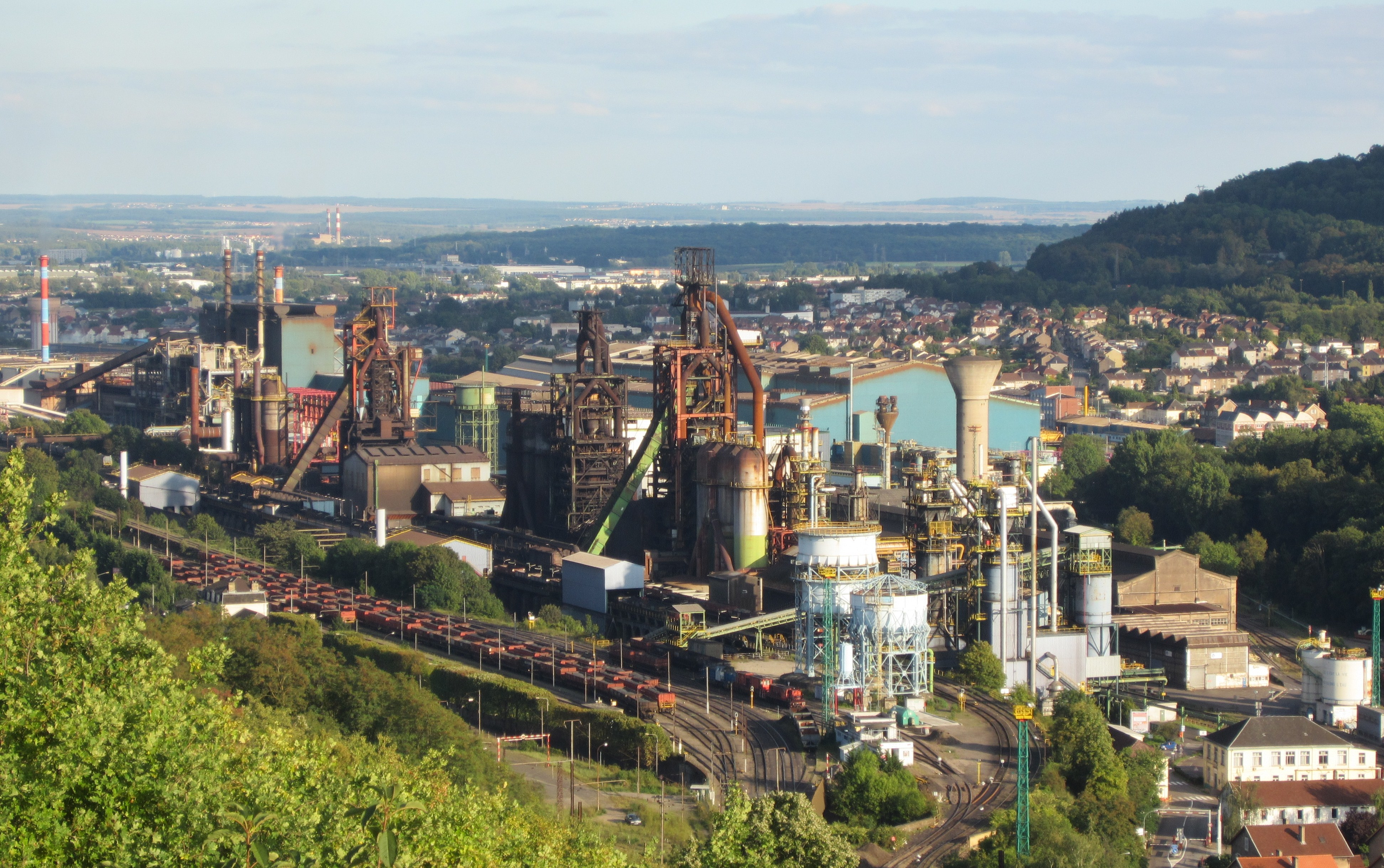 Description